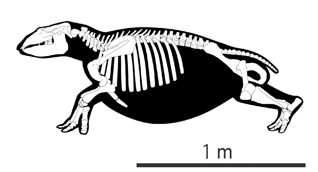 Skeletal illustration of Ashoroa